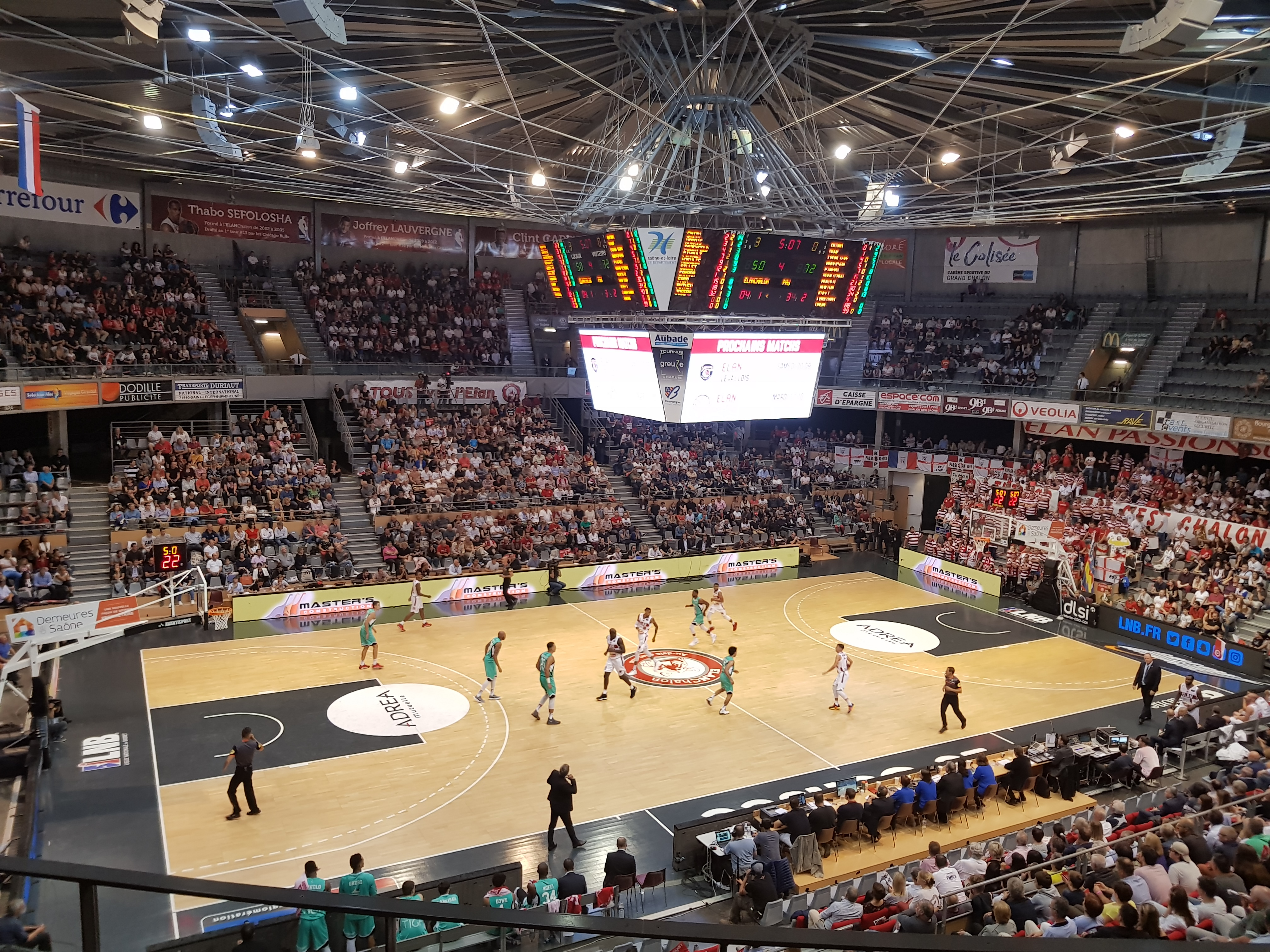 Match de Pro A (saison 2017-2018) entre l'Elan Chalon et l'Elan Béarnais au Colisée de Chalon-sur-Saône.